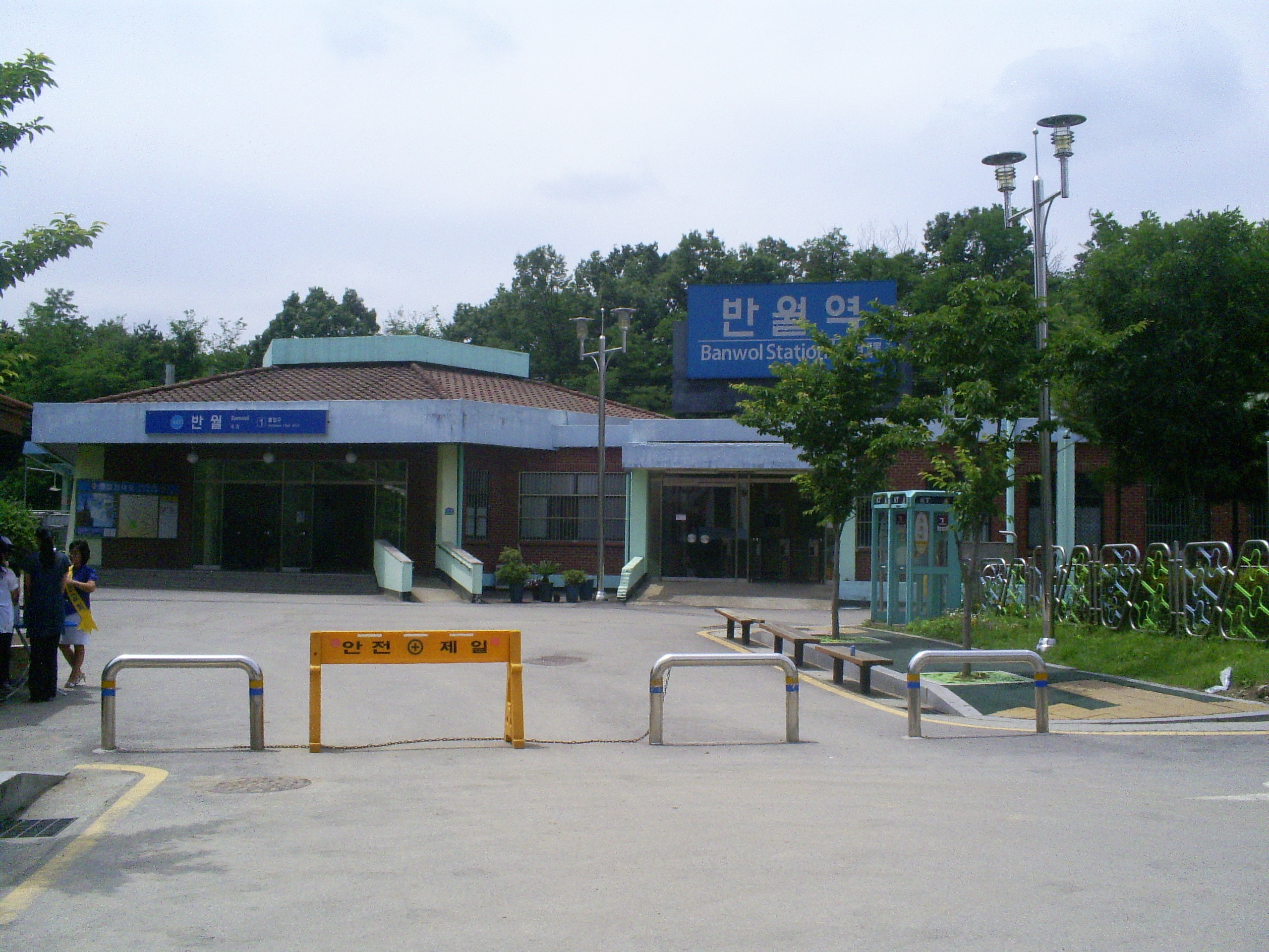 韓国鉄道公社安山線半月駅の全景